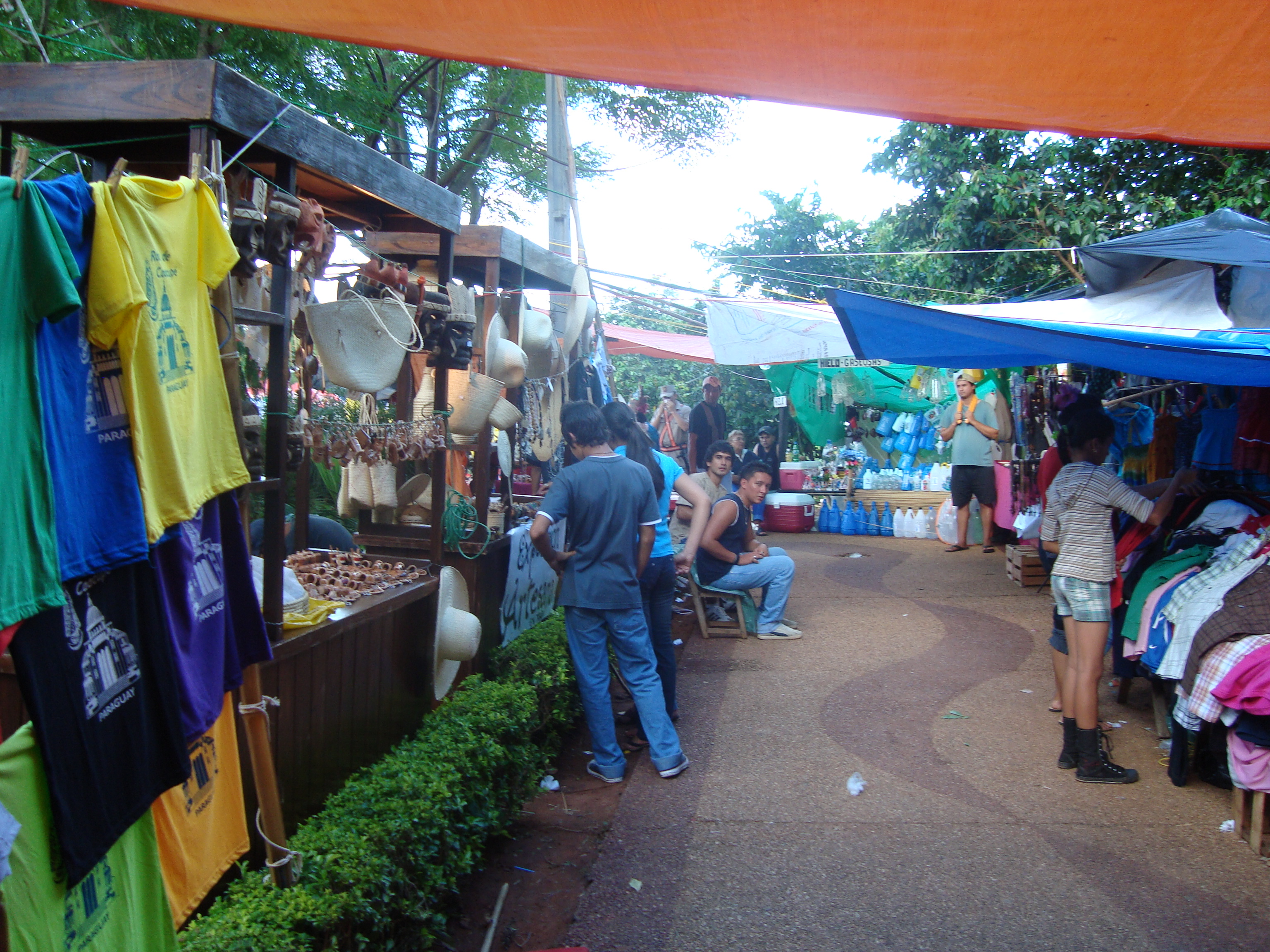 La fiesta anual de la Virgen de los Milagros de Caacupé (Paraguay) es una buena oportunidad de ventas para productores y comerciantes locales.